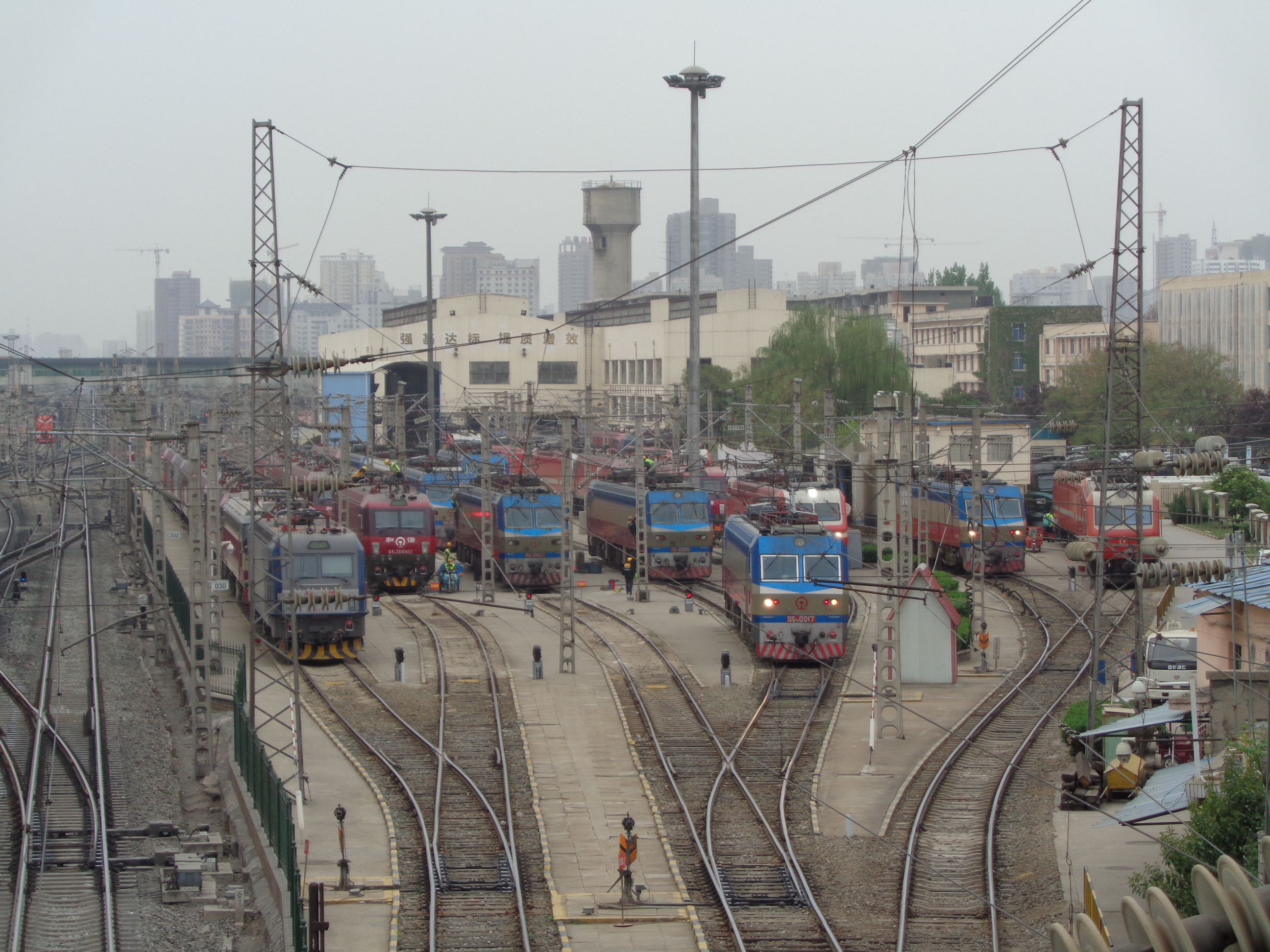 西安火车站机务组及旁边铁路